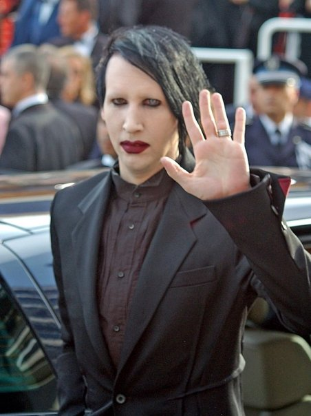 Marilyn Manson au festival de Cannes